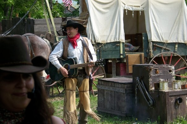 Cowboyland, parco divertimenti di Voghera, Lombardia, Italia.